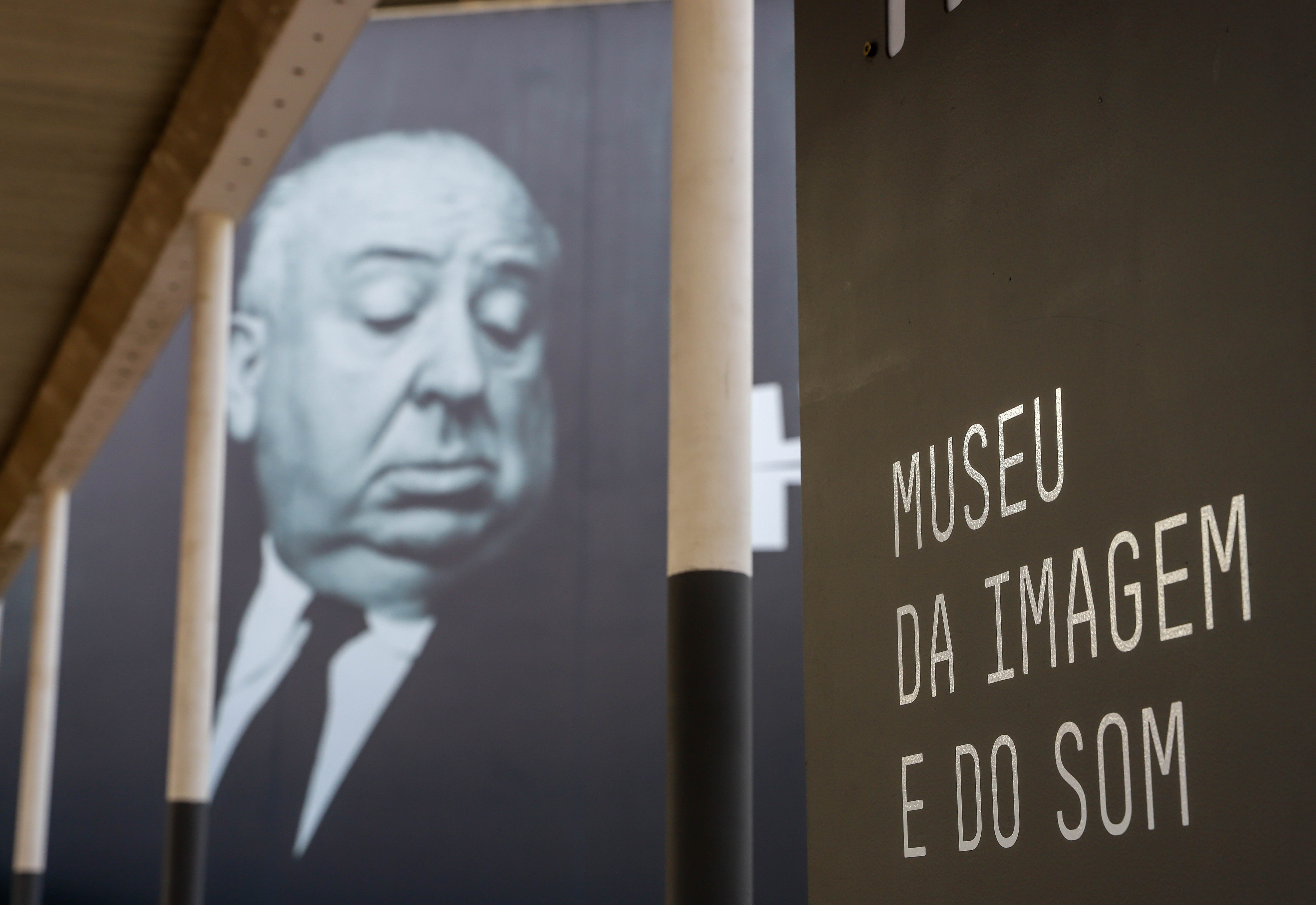 A partir da atmosfera e personalidade do cineasta considerado mestre do suspense, o MIS apresenta a exposição Hitchcock – Bastidores do suspense. Local: São Paulo/SP Data: 25/07/2018 Foto: Governo do Estado de São Paulo